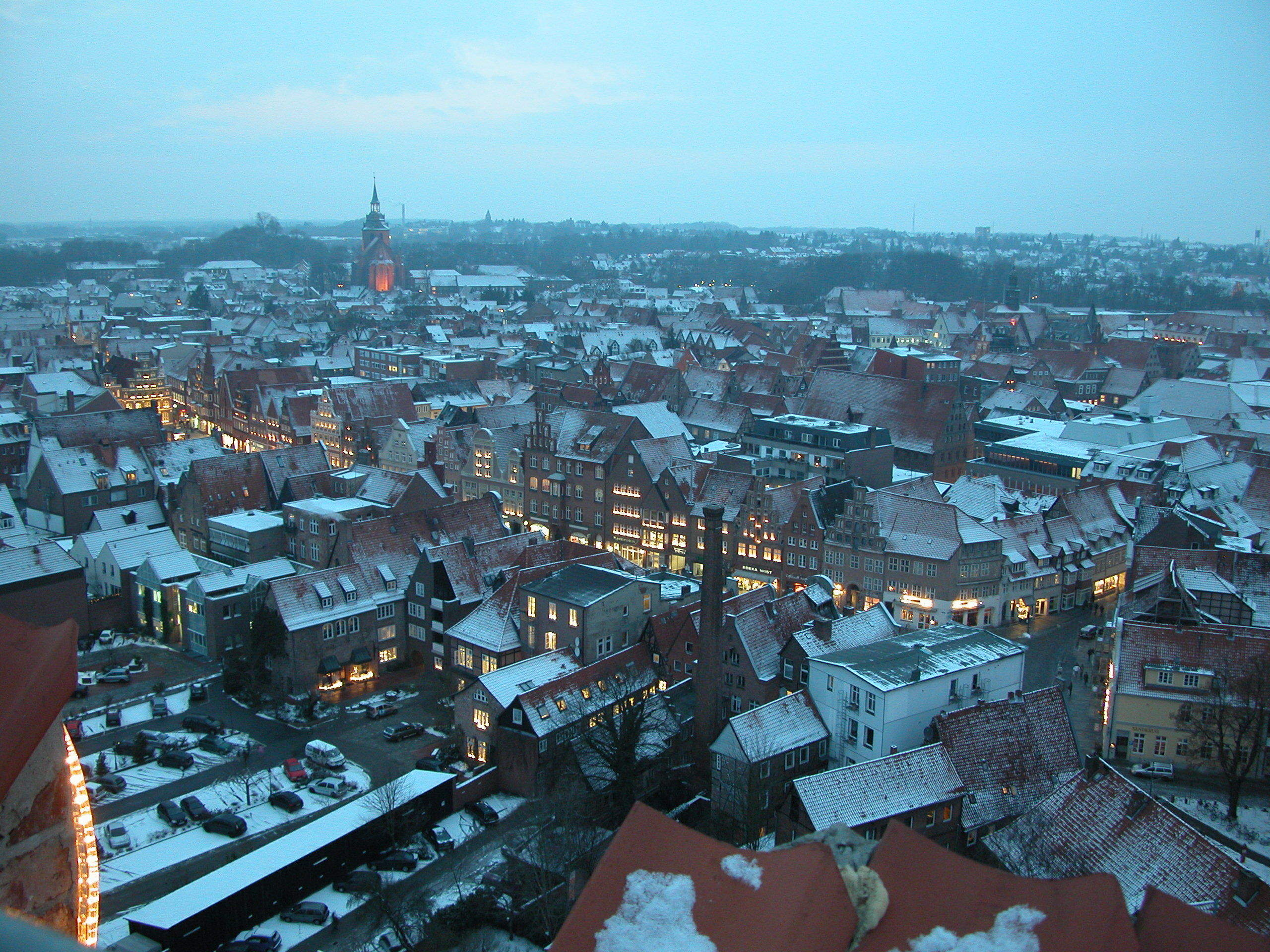 Vista de la ciudad de Luneburgo nevado desde la iglesa de San Nicolás.